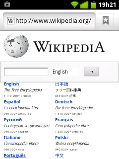 Captura de tela do celular Samsung i5500, com o sistema operacional Android 2.3.7 instalado, exibindo a página inicial da Wikipedia com o navegador padrão do sistema.